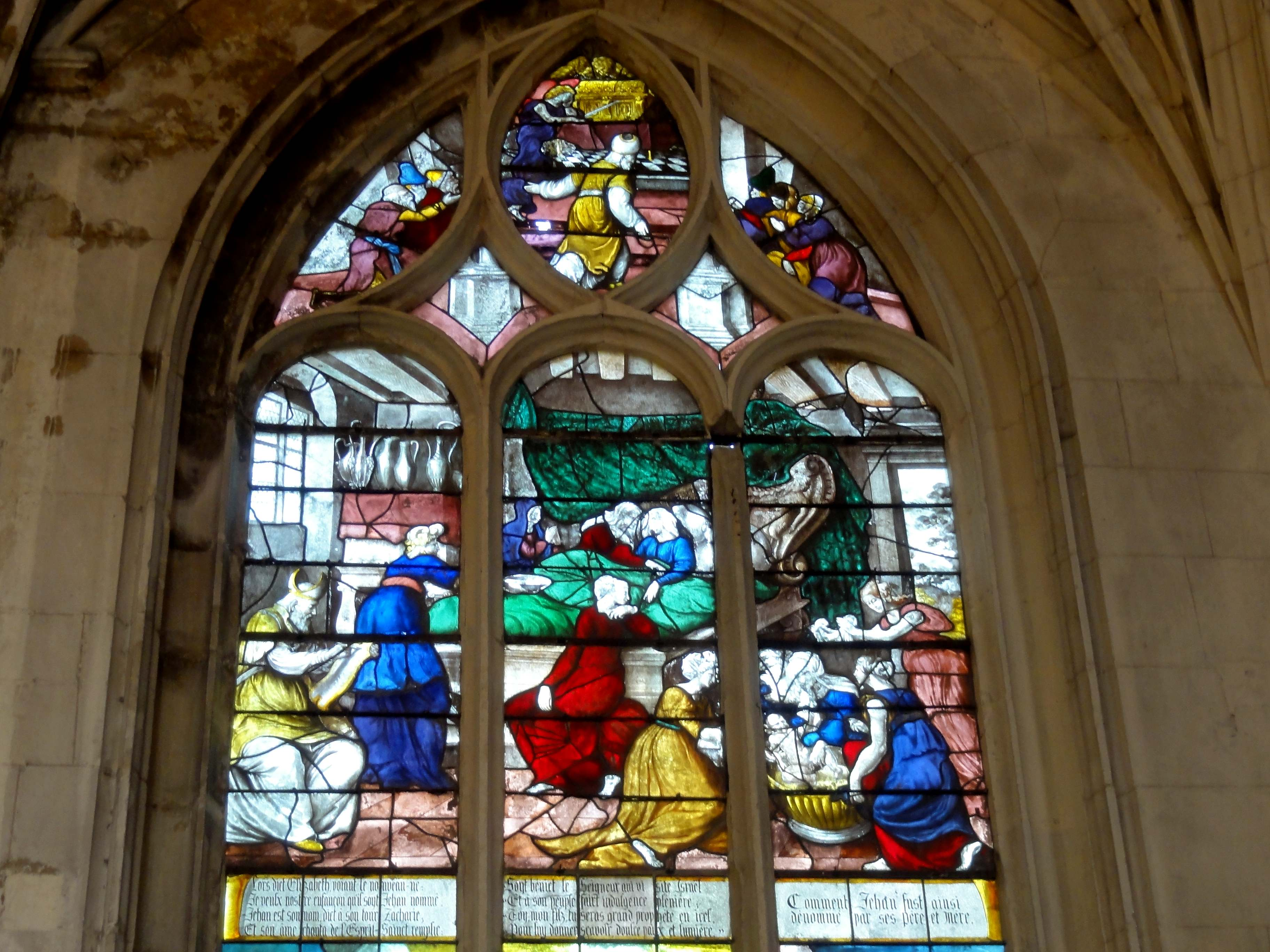 Verrière n° 7 (nord du déambulatoire) - naissance de St Jean-Baptiste ; tympan : Zacharie.